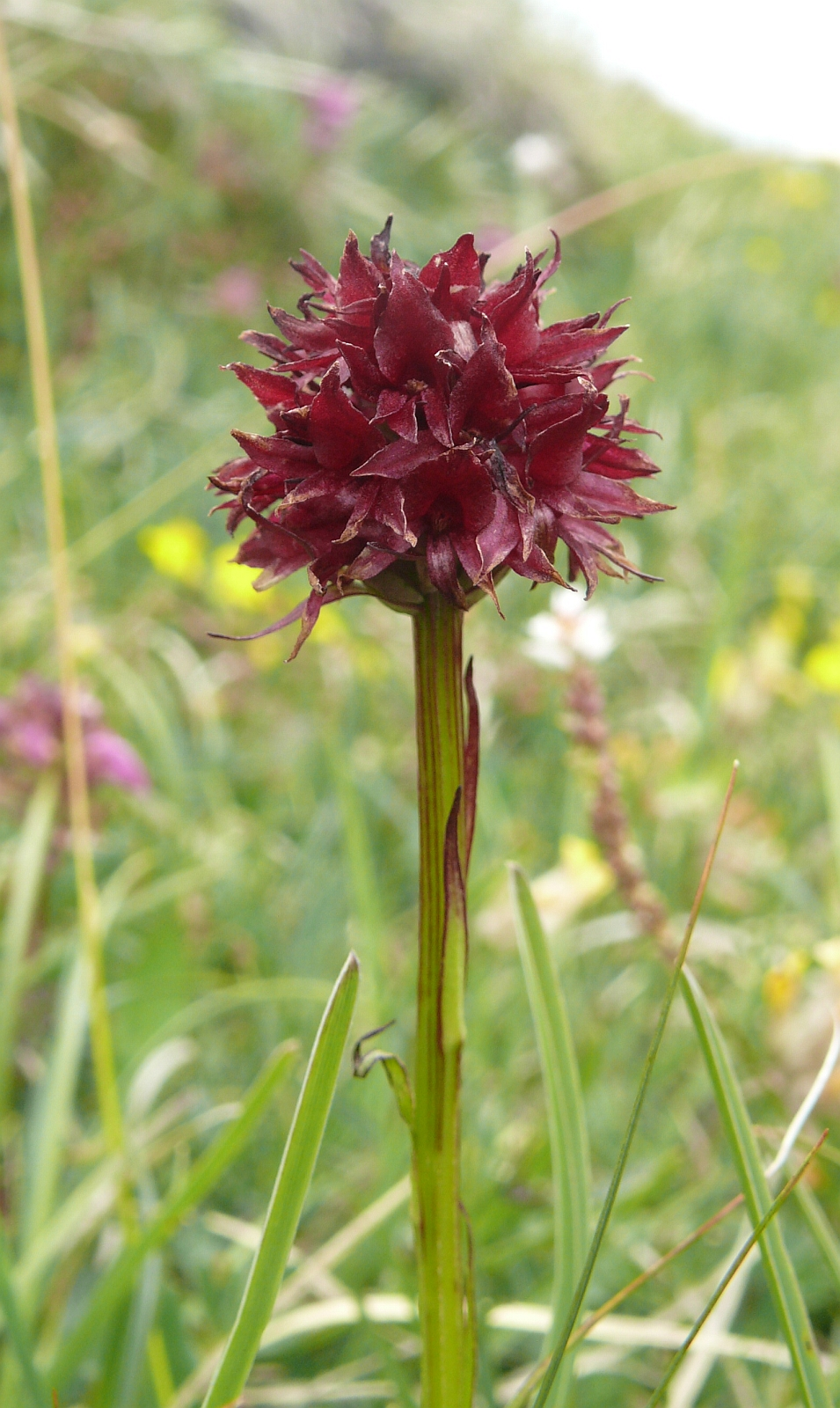 Nigritella austriaca, Puez-Geisler-Gruppe, Italy